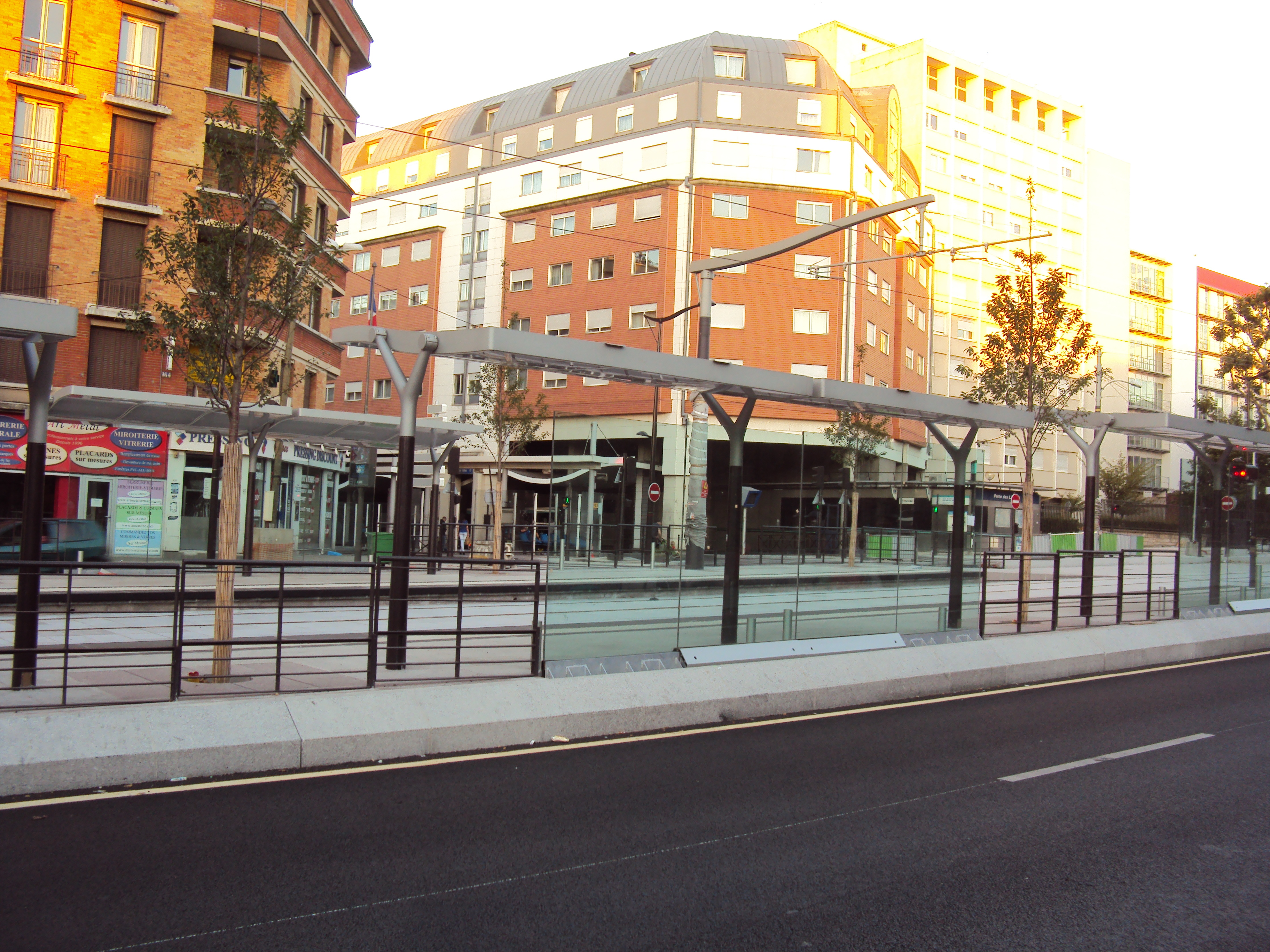 Station porte des Lilas. A l’arrière plan la gare routière